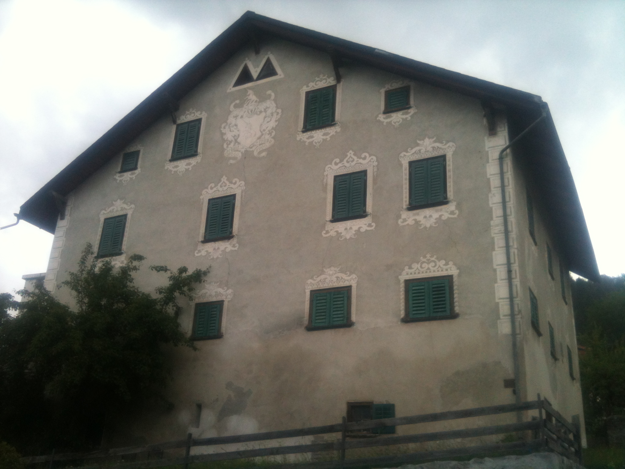 Südseite eines Hauses in Sagogn, mit Wappen der Familie Candrian und Baujahrangabe 666(1666?).